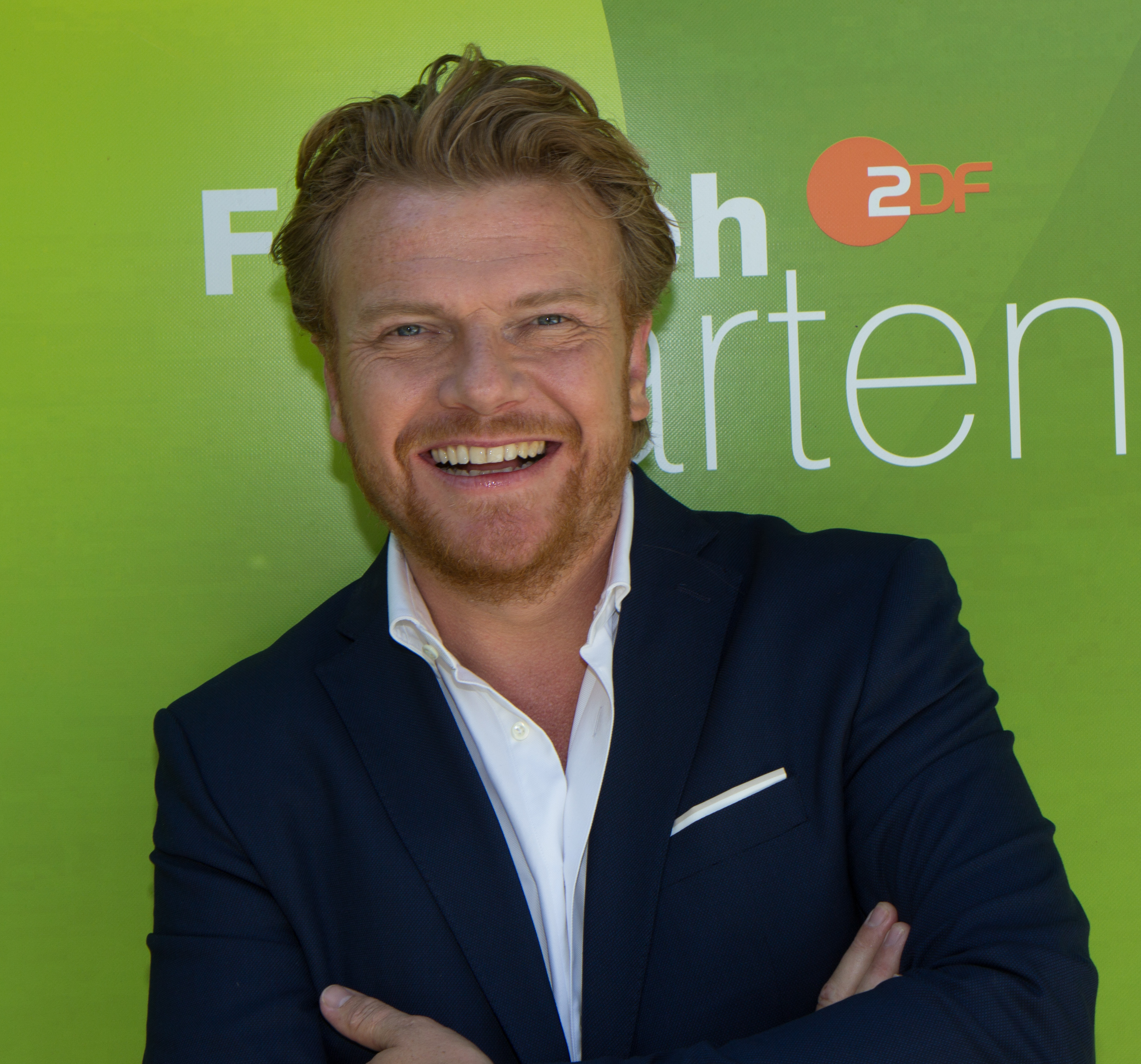 Bastiaan Ragas als Gast im ZDF-Fernsehgarten am 16. September 2018 in Mainz.